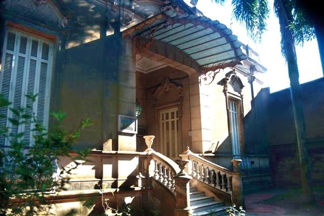 Histórica casona de Junín, provincia de Buenos Aires, Argentina. Aquí funcionó la Escribanía Ordiales, donde se confeccionó el acta de matrimonio civil entre Eva Duarte y Juan Domingo Perón el 22 de octubre de 1945. Es de estilo académico con reminiscencias italianas. Fotografía tomada a principios de 2006.